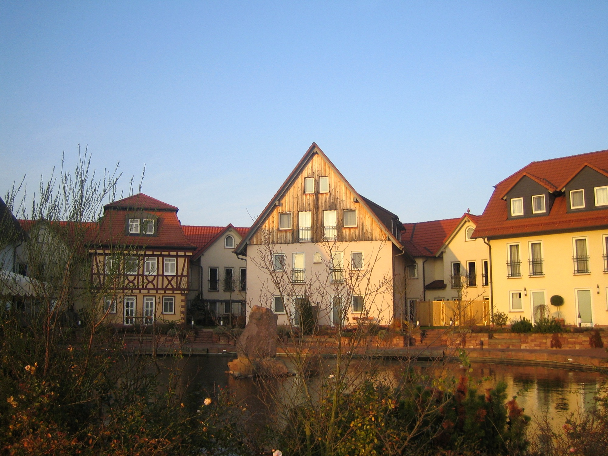 Das "Seehotel" in Niedernberg, Bayern, Deutschland